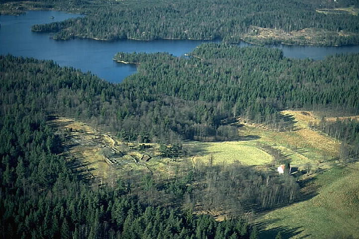 Medeltida kolonisationsområde på Vättlefjäll. Motiv: Björsjöås Nyckelord: Flygbilder, Riksintressen Kategori: Husgrund, förhistorisk/medeltida Medeltida kolonisationsområde på Vättlefjäll.